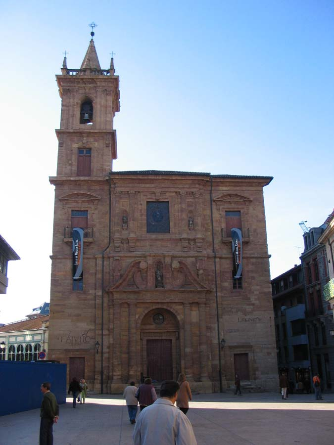 Descripción: Iglesia de San Isidoro de Oviedo. Fuente: Foto tomada por Rodrigouf el 21 de octubre de 2005.